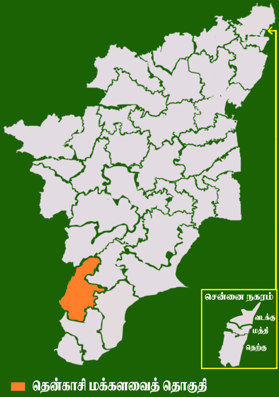 தமிழக வரைபடத்தில் உள்ள தென்காசி மக்களவைத் தொகுதி